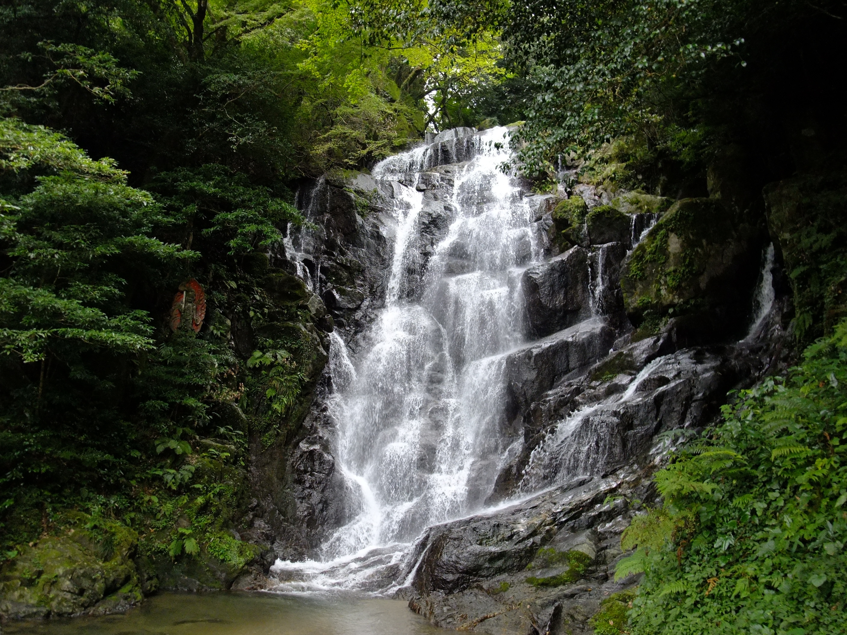 福岡県糸島市にある白糸の滝